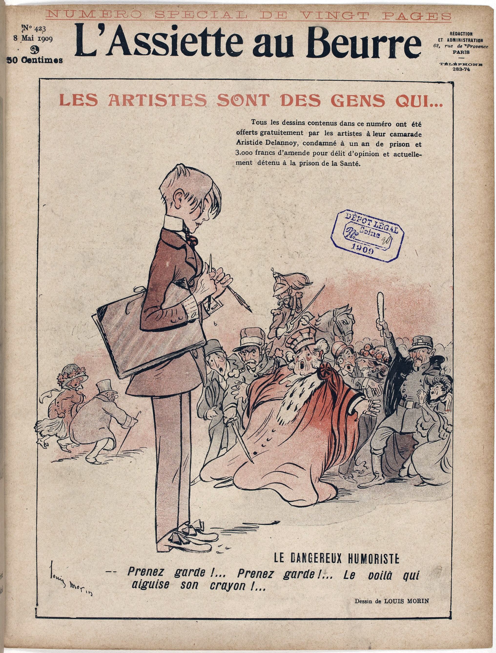 Cover